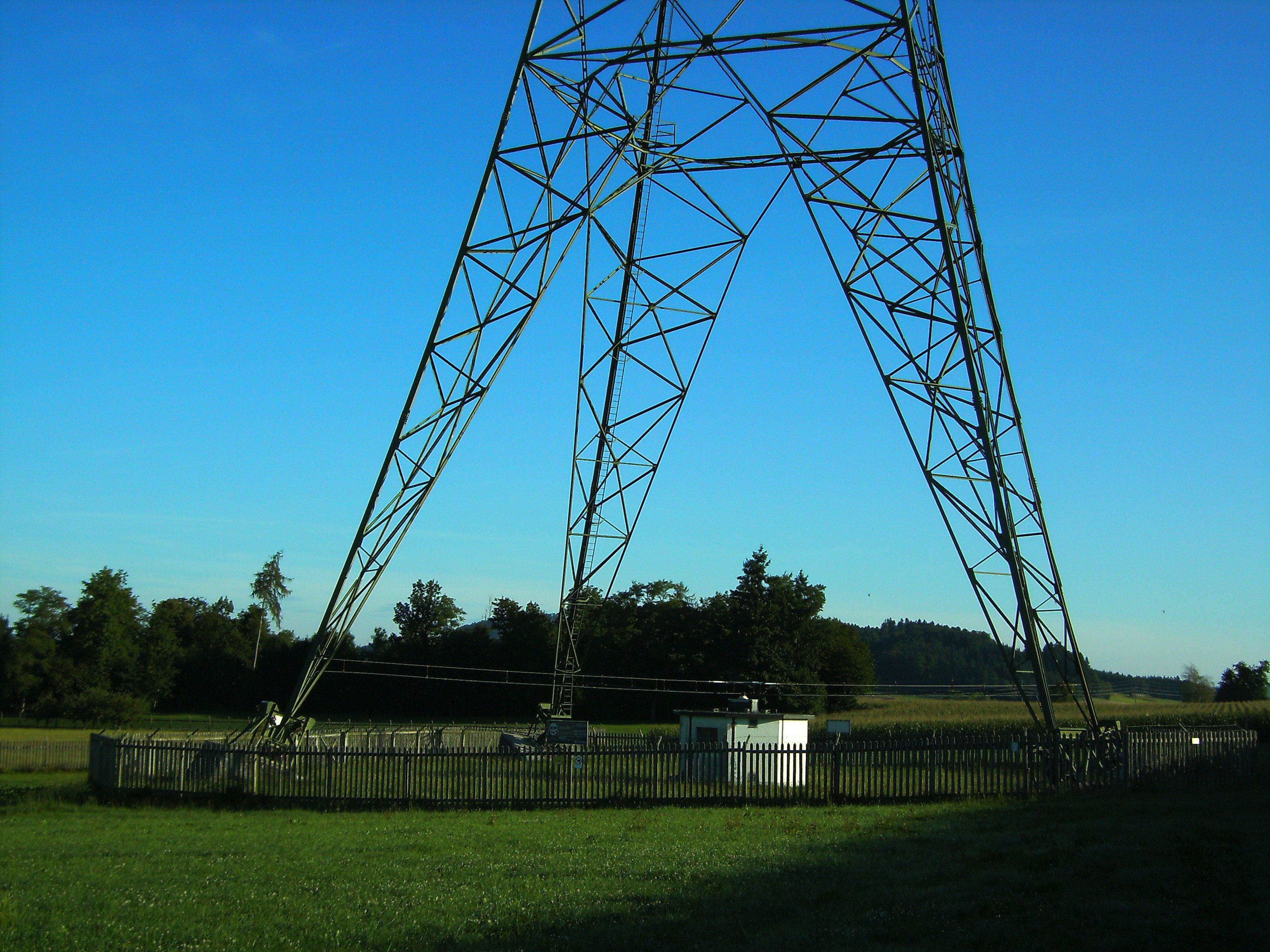 Unterteil Reservesendeturm Beromünster